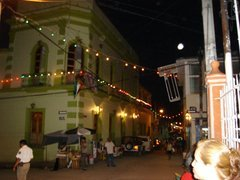 El Ayuntamiento de Zumpango del Rio a la izquierda.